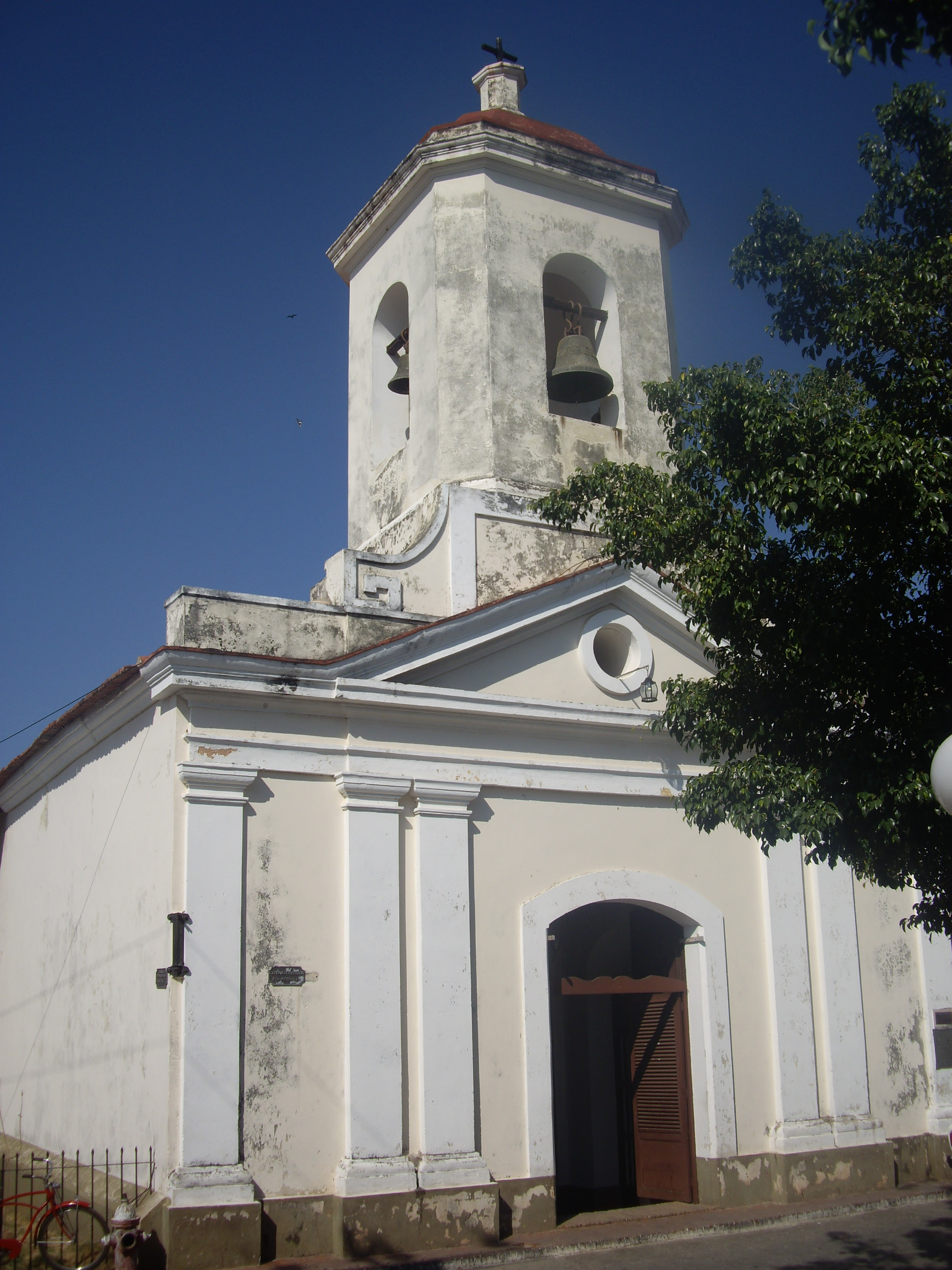 Església de Sant Francesc de Paula a Trinidad, Cuba